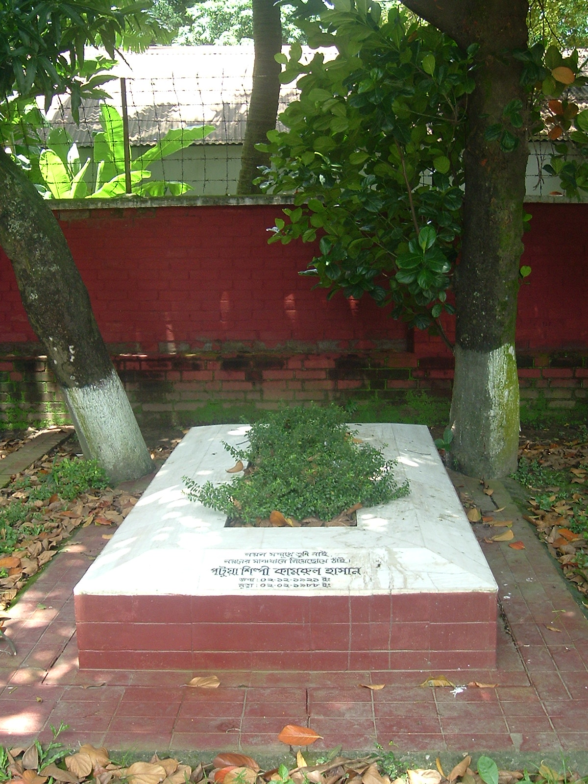 Kamrul Hasan Tomb, DU, Dhaka.